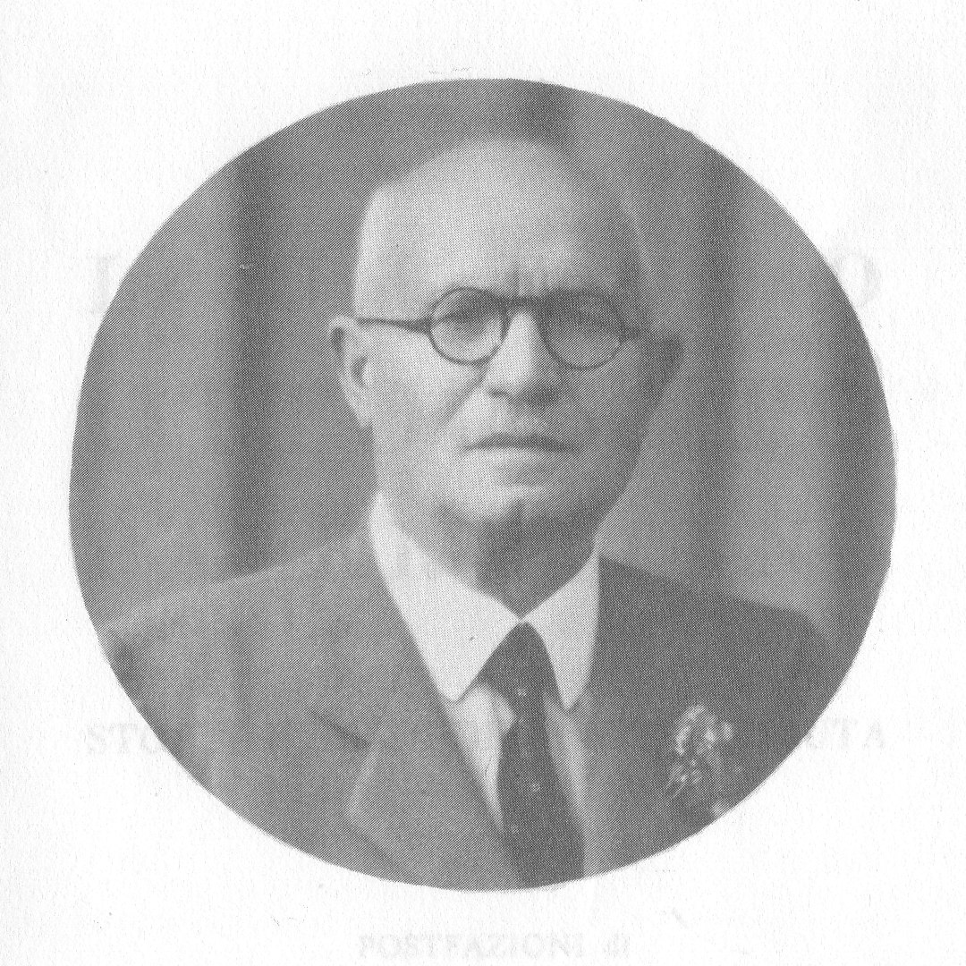 Oreste Lo Valvo